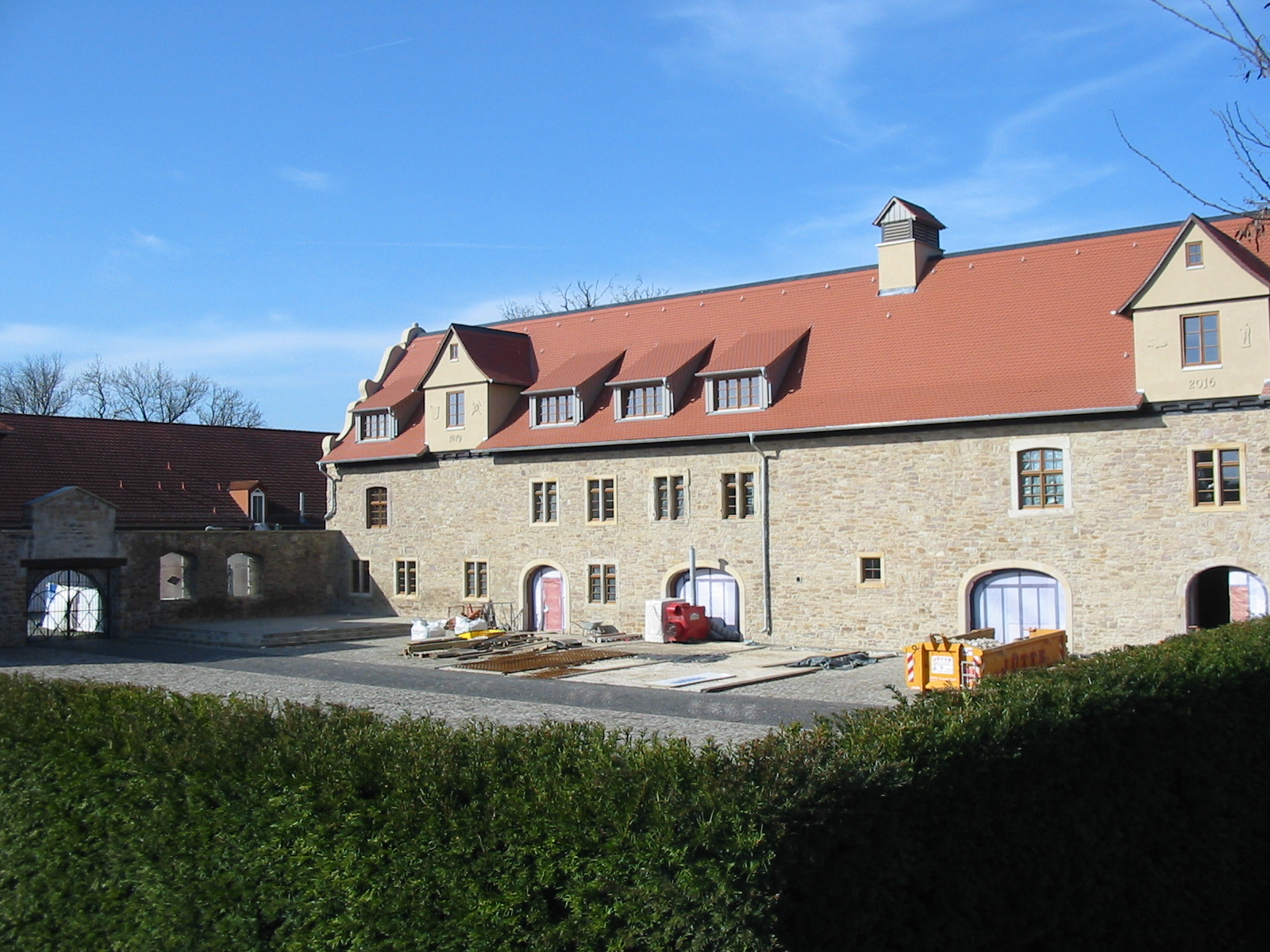 Messinghof in Kassel-Bettenhausen, Herstellungsort der Kasseler Herkulesskulptur. Stand der Sanierungen im März 2017.